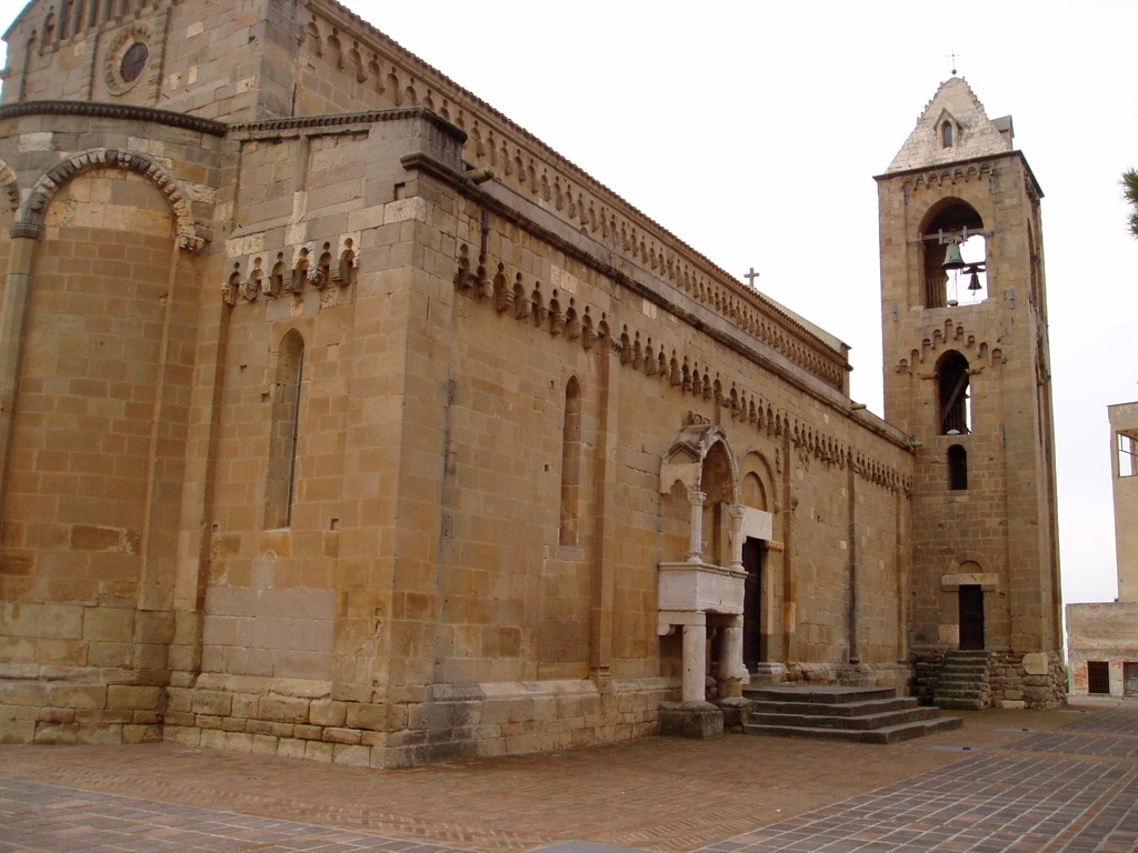 Ex cattedrale di San Panteleo, a Dolianova.